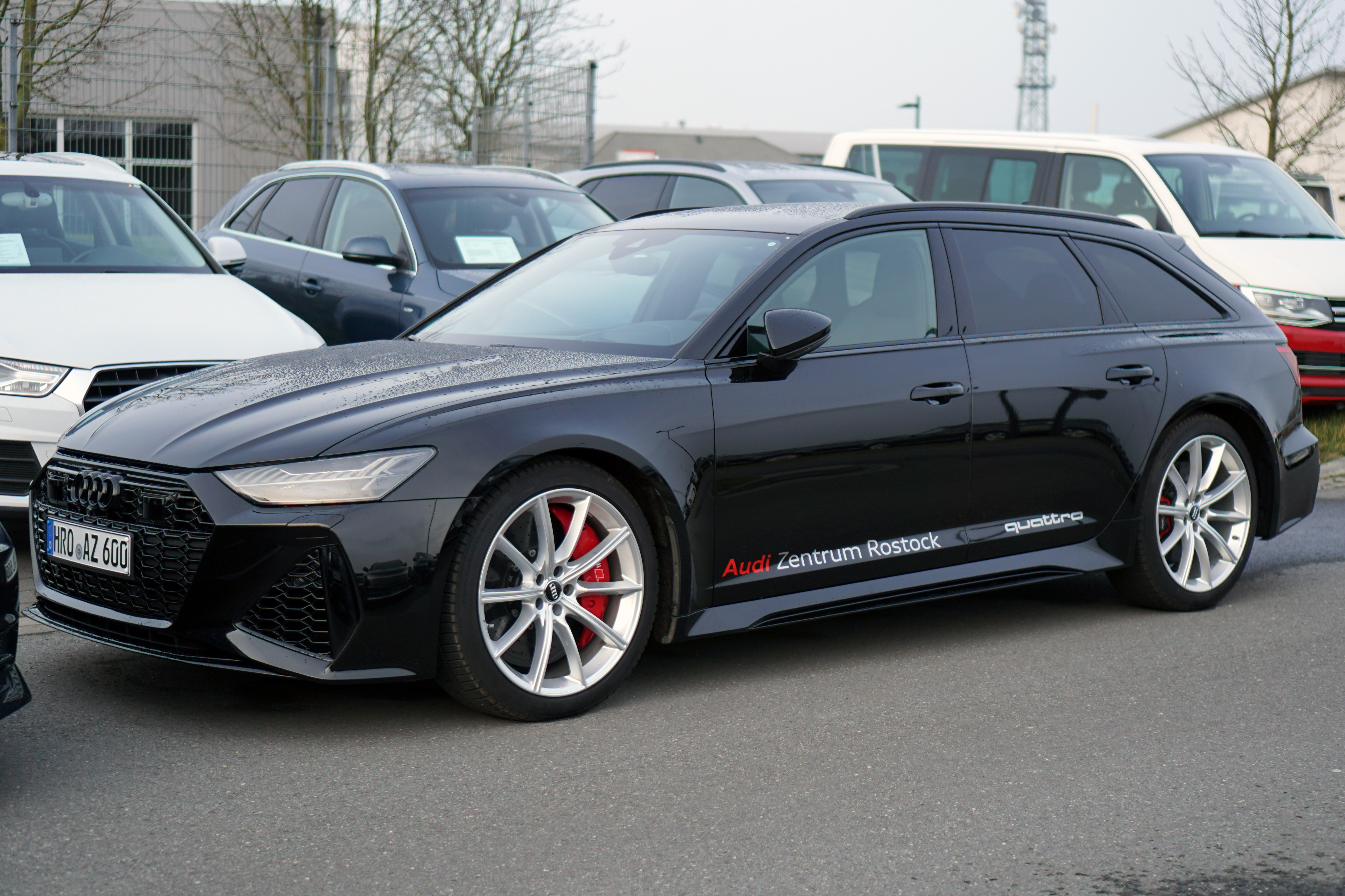 Audi RS6 C8 2020 Winter-Leichtmetallräder – 21 Zoll – im 10-Speichen-Stern-Design silber, HD Matrix-LED-Scheinwerfer mit Audi Laserlicht